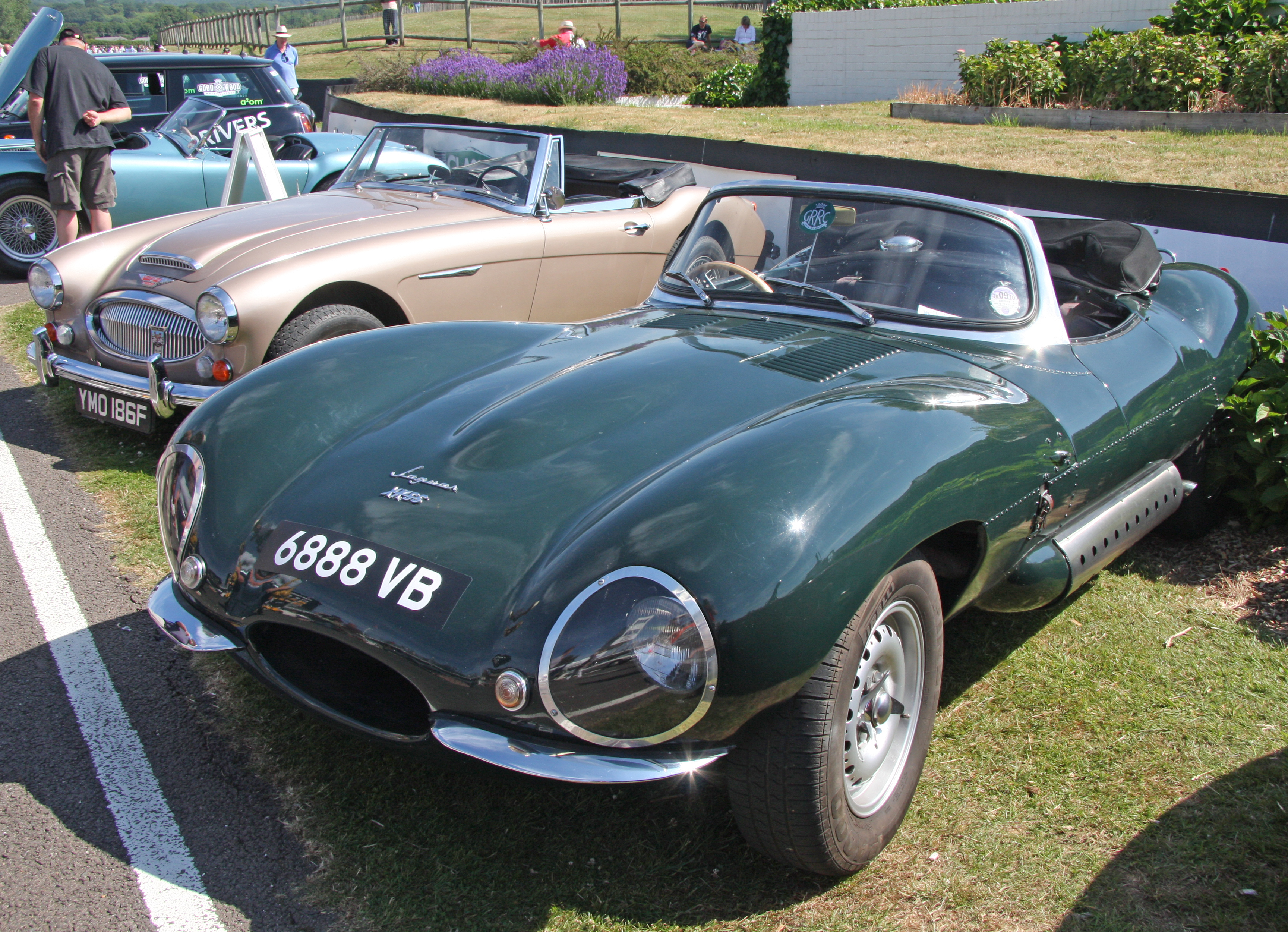 Jaguar XK-SS